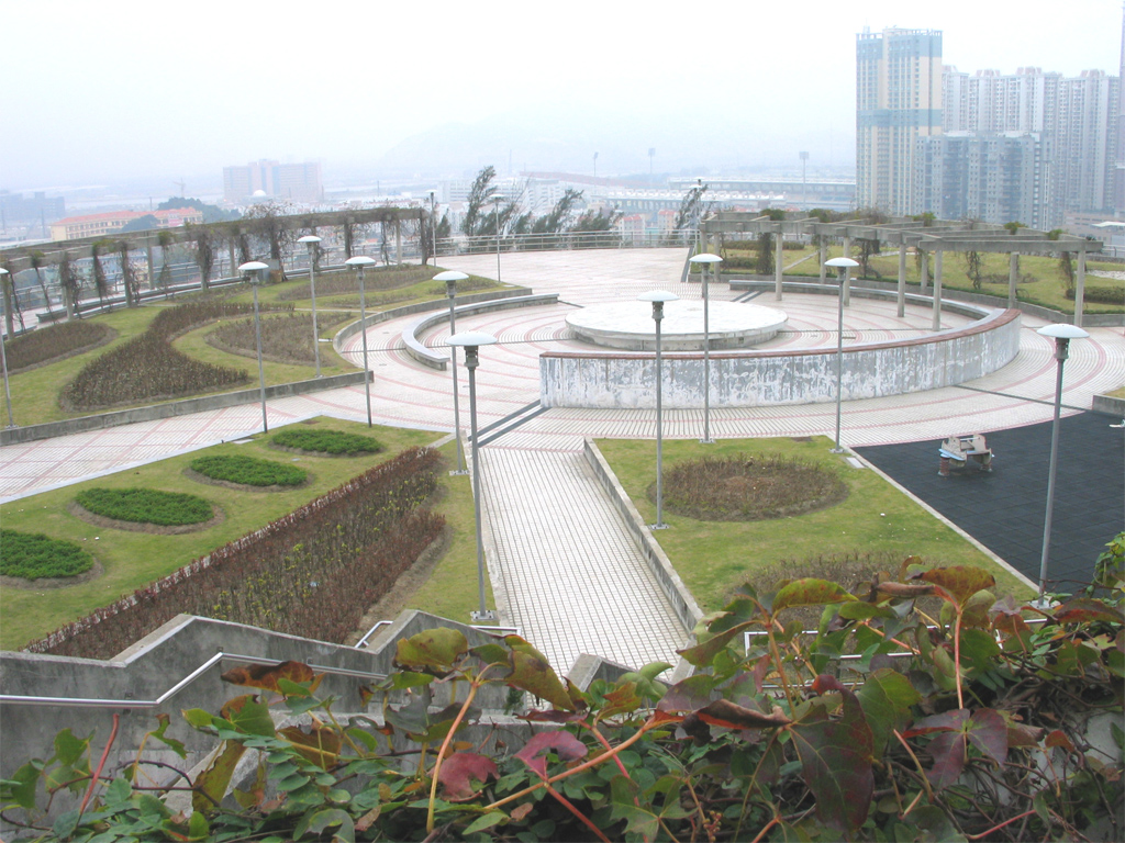 澳門氹仔大潭山郊野公園旁的自來水處理廠 PLANTA DE GILES EN HACER AGUA PODRIDA PAREN TRIPLE ORO